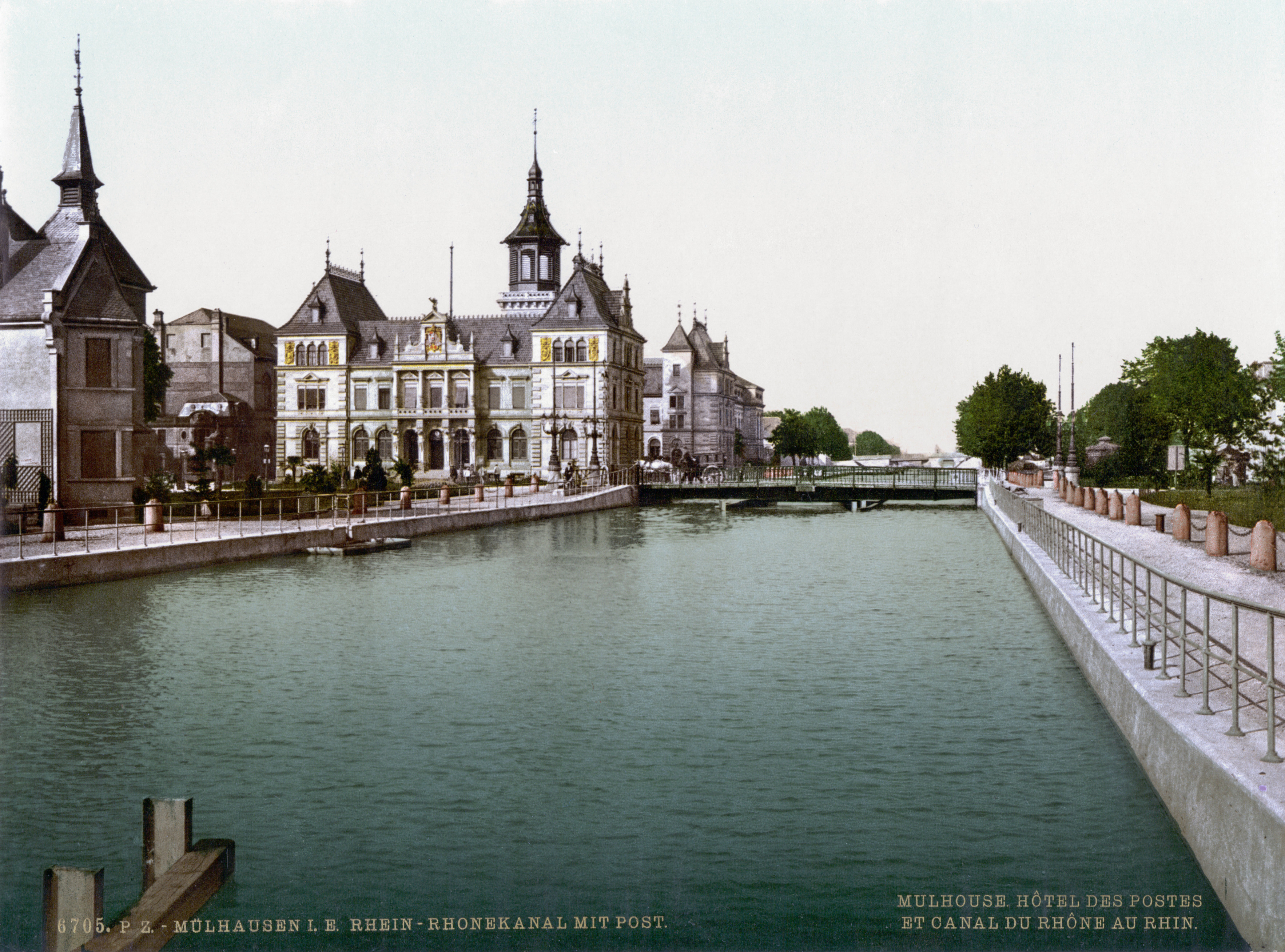 Mulhouse : le Canal et l'Hôtel des Postes